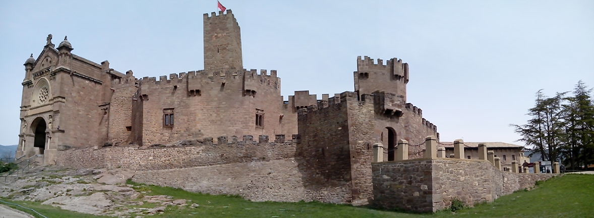 Panorámica del castillo de Javier (Navarra).